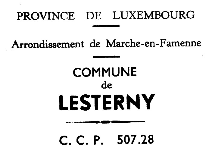 Numérisation de l'en-tête du papier à lettre communal, grâce à la collaboration de l'ancien bourgmestre Jules Hérin. Photo Alain Canneel.